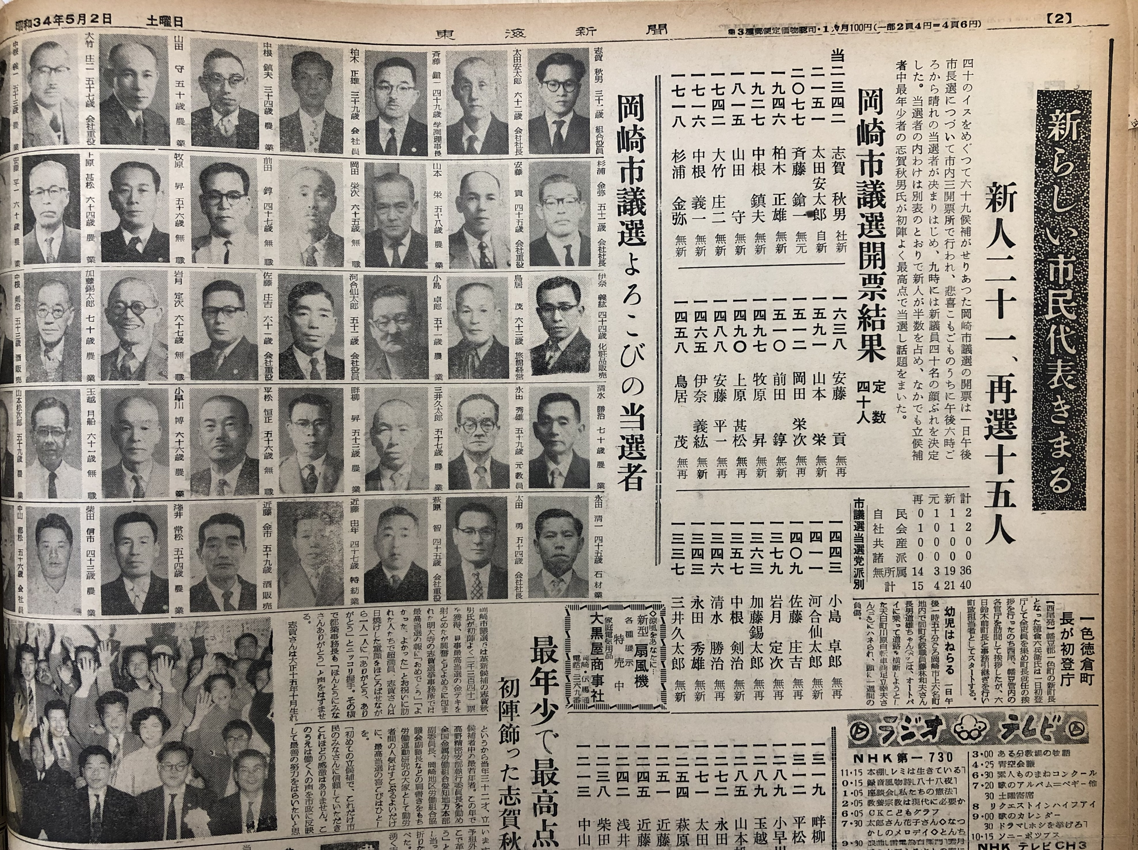 『東海新聞』1959年5月2日、2面。岡崎市議会議員選挙を報じる記事。